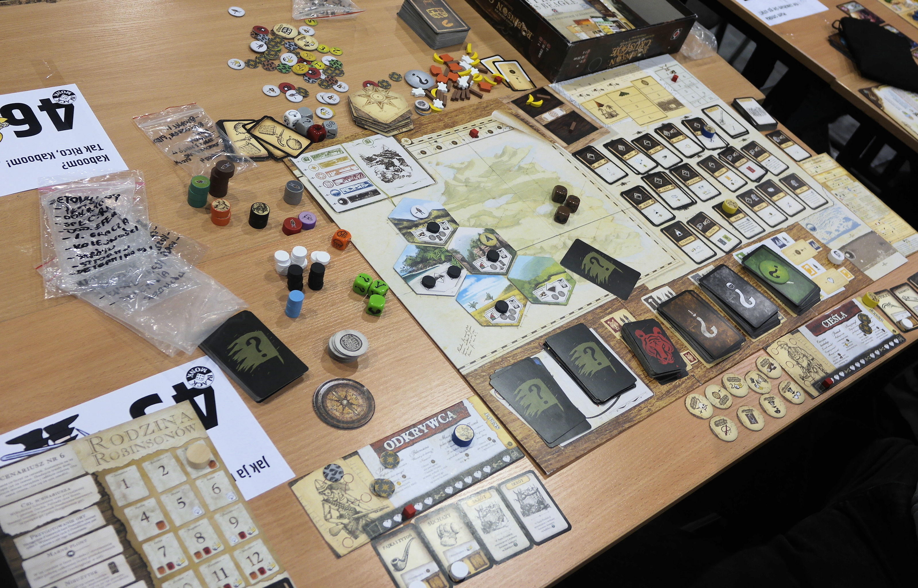 Rozgrywka w grę planszową "Robinson Crusoe: Przygoda na przeklętej wyspie", Pyrkon, Poznań 2017